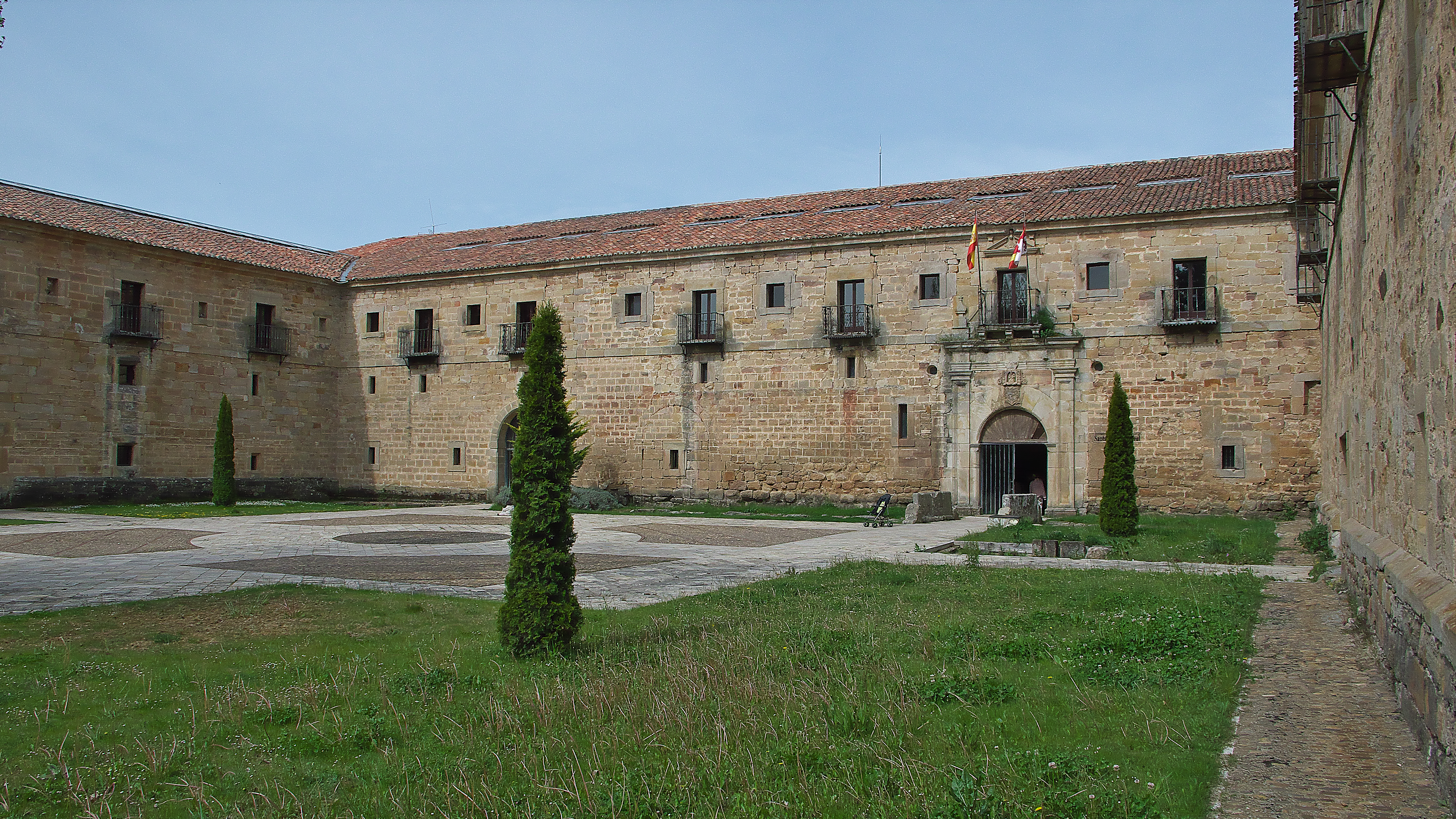 Actual entrada al monasterio.